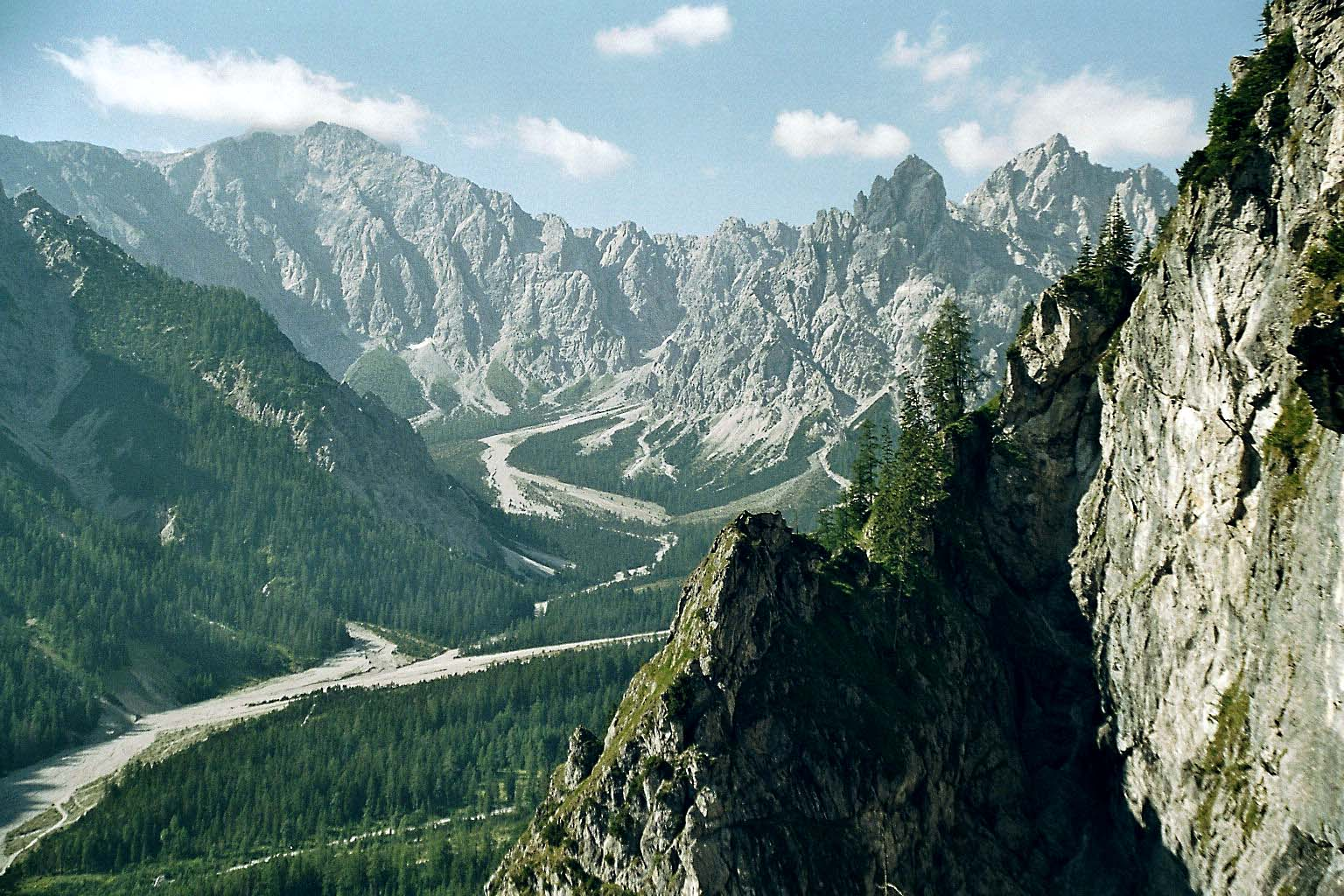 Blick auf das hintere Wimbachtal. Im Hintergrund rechts Palfelhörner (2.222 m) und links Kühleitenschneid mit Hundstodkendelkopf (2.396 m).